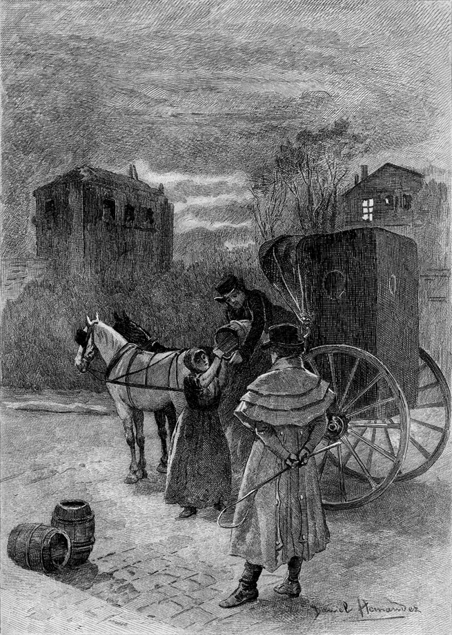 Illustration of Honoré de Balzac's Eugénie Grandet (1834).